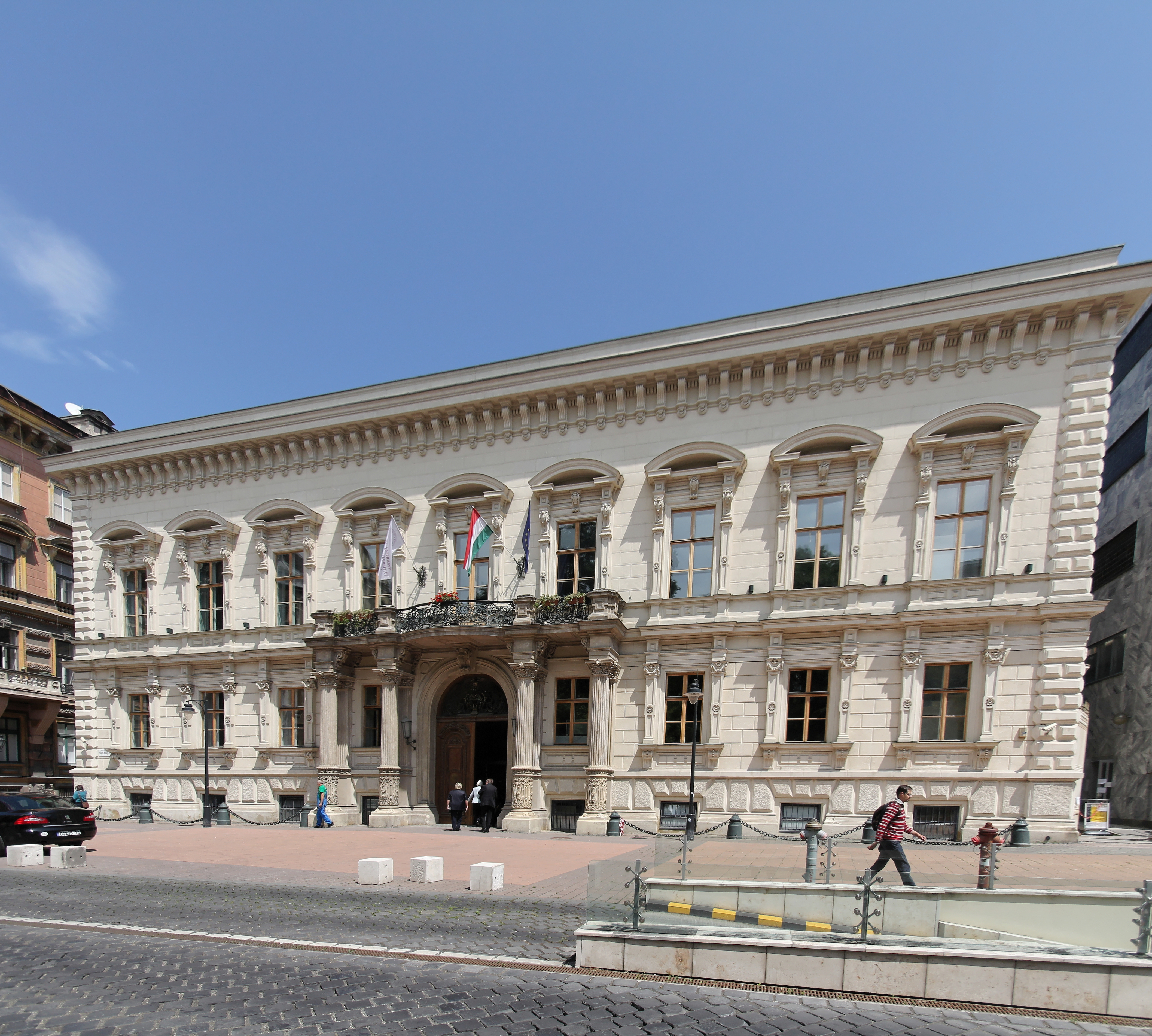 Andrassy Universität Budapest; Hauptgebäude